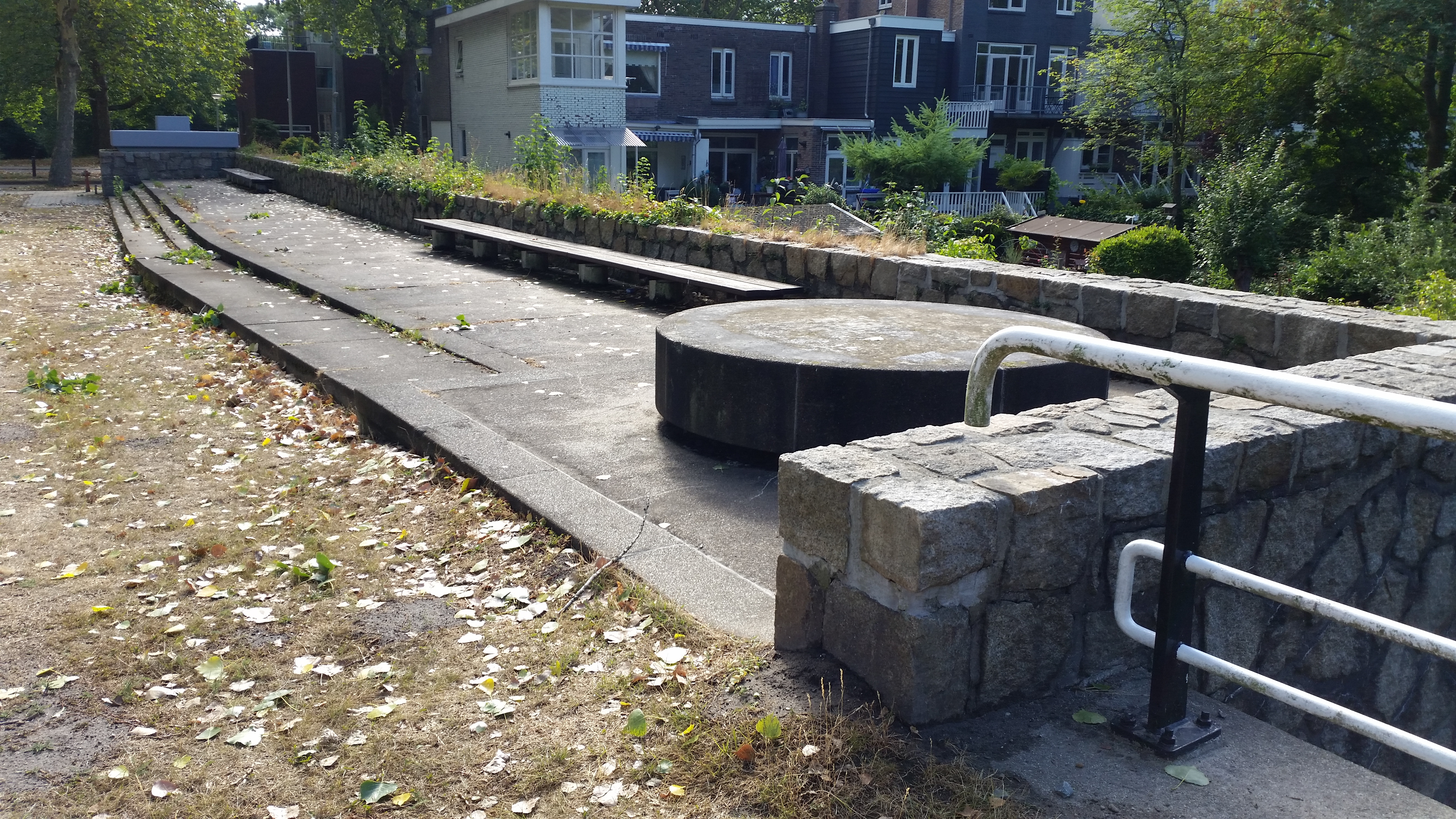 Vleugelmuur bij Brug 501 (in Amsterdam) met kaarttafel, bankjes, kist en sokkel van vlaggenmast